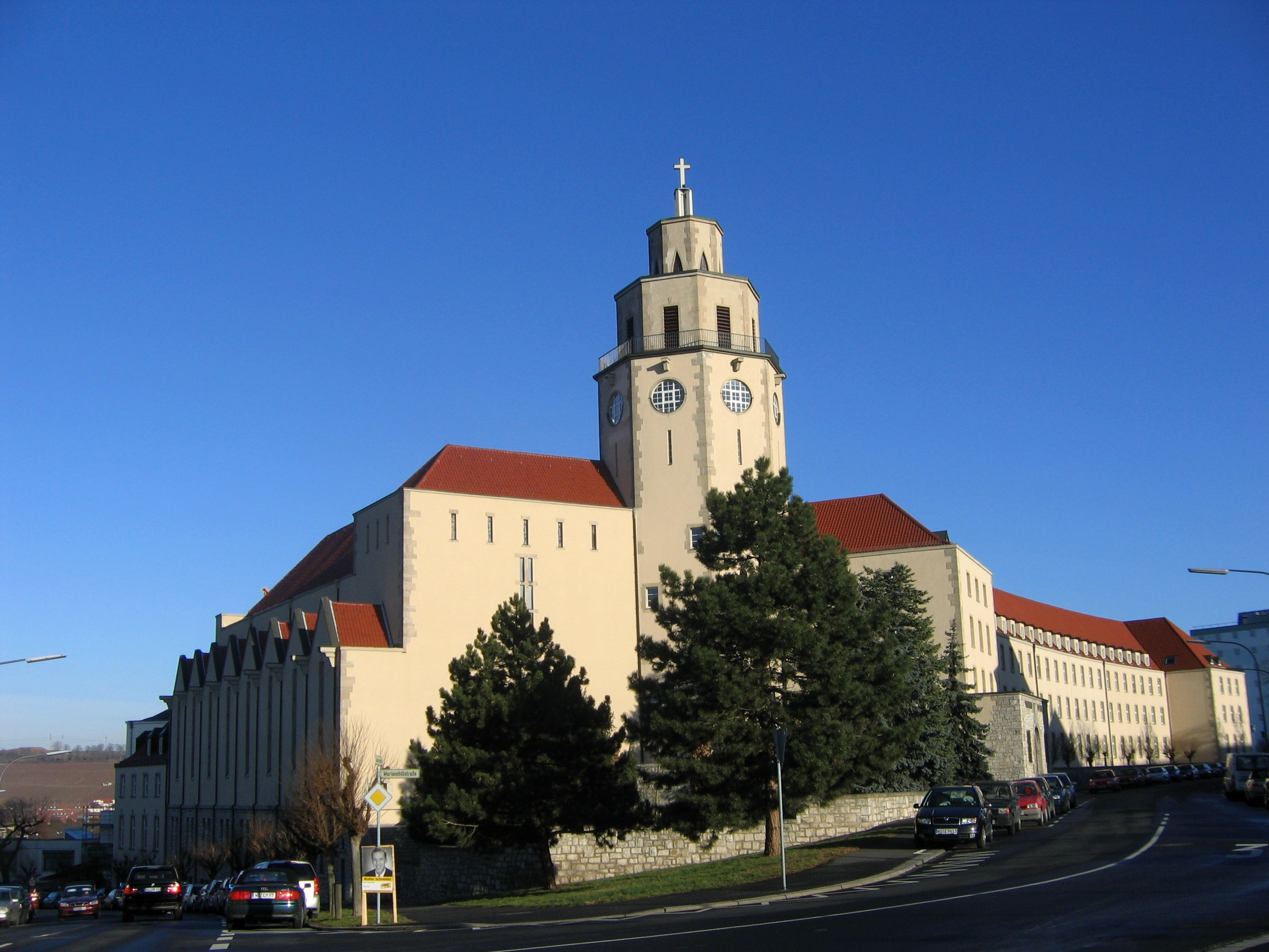 The Marianhiller Mission in Würzburg